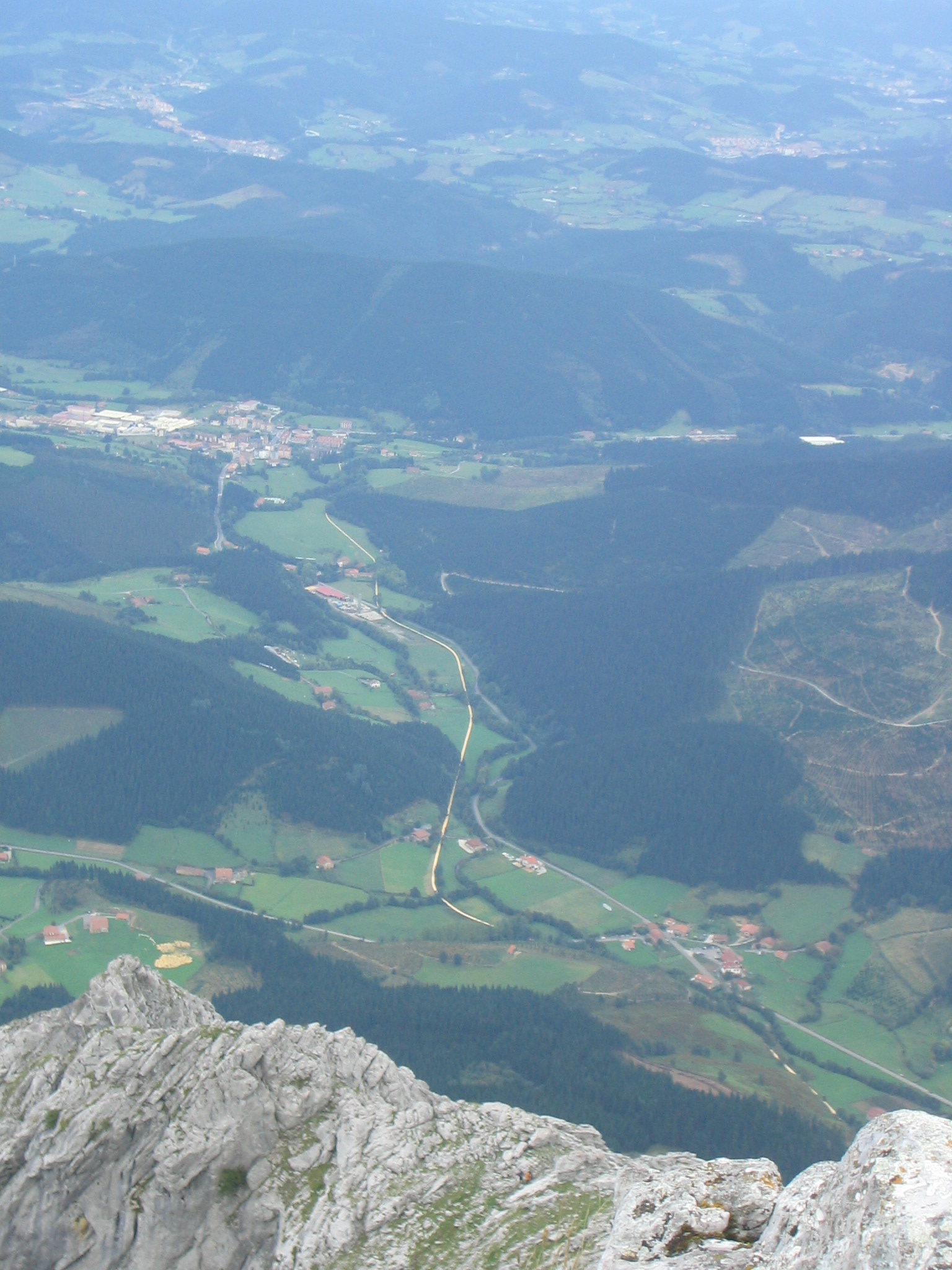 Vista geneal del barrio de Marzana Vista general de Marzana, barrio de Achondo en Vizcaya, País Vaco, España. Bajo el monte Amboto.